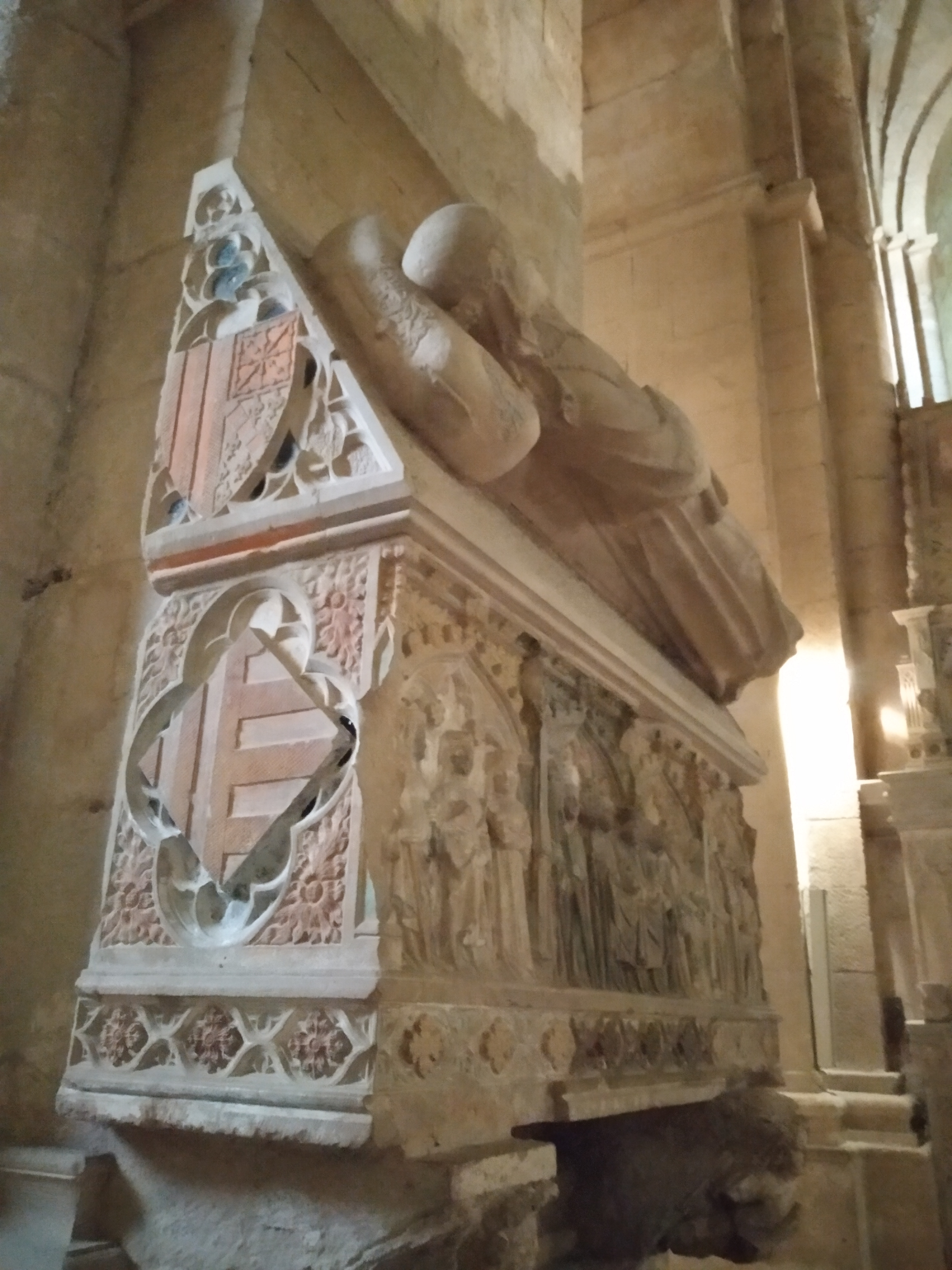 Maria Nafarroakoren hilobia